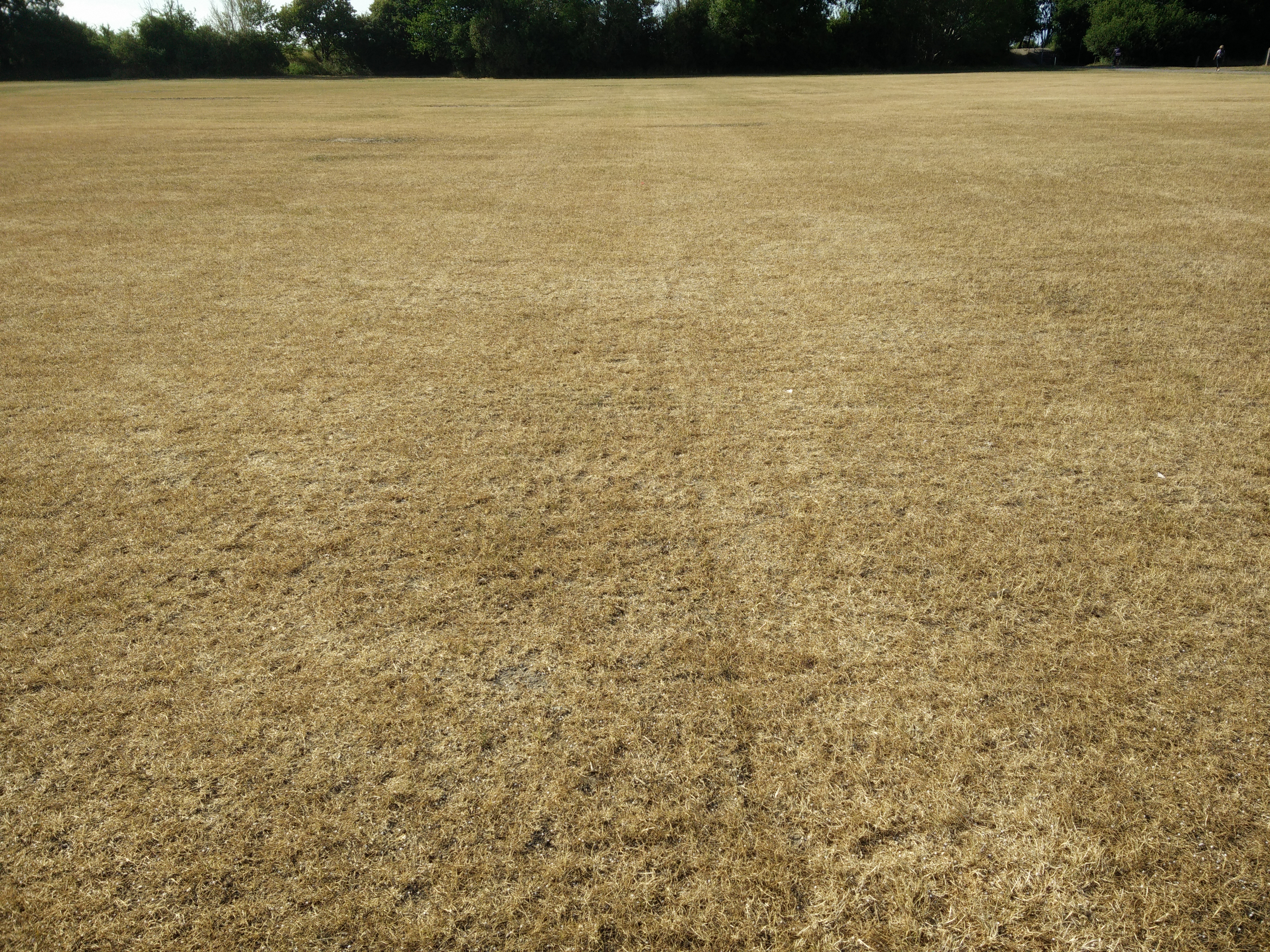 Gräsmatta Malmö sommartorkan 2018, fortfarande under första halvan av juni.